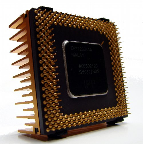 Процессор Intel Pentium